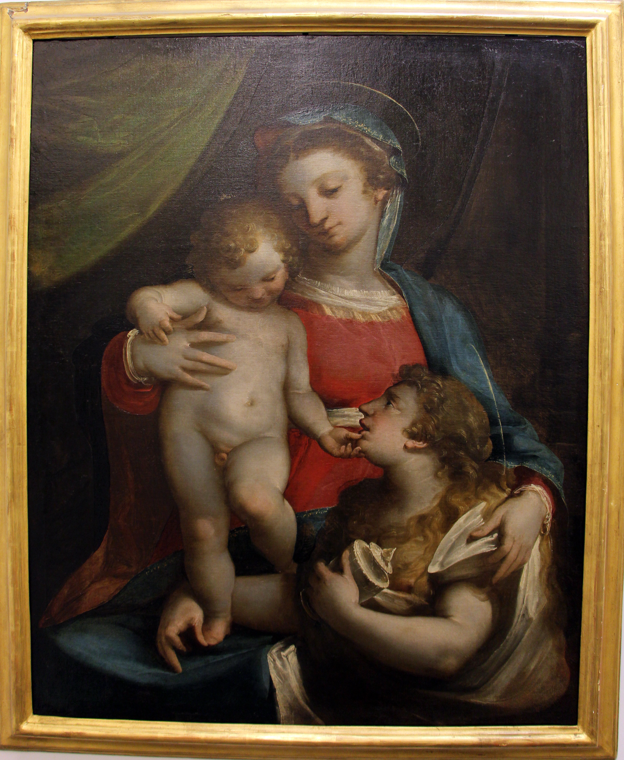 Palazzo Bianco o Palazzo Doria Brignole - Musei di Strada Nuova The making of this document was supported by Wikimedia CH. (Submit your project!) For all the files concerned, please see the category Supported by Wikimedia CH. This is a photo of a monument which is part of cultural heritage of Italy.